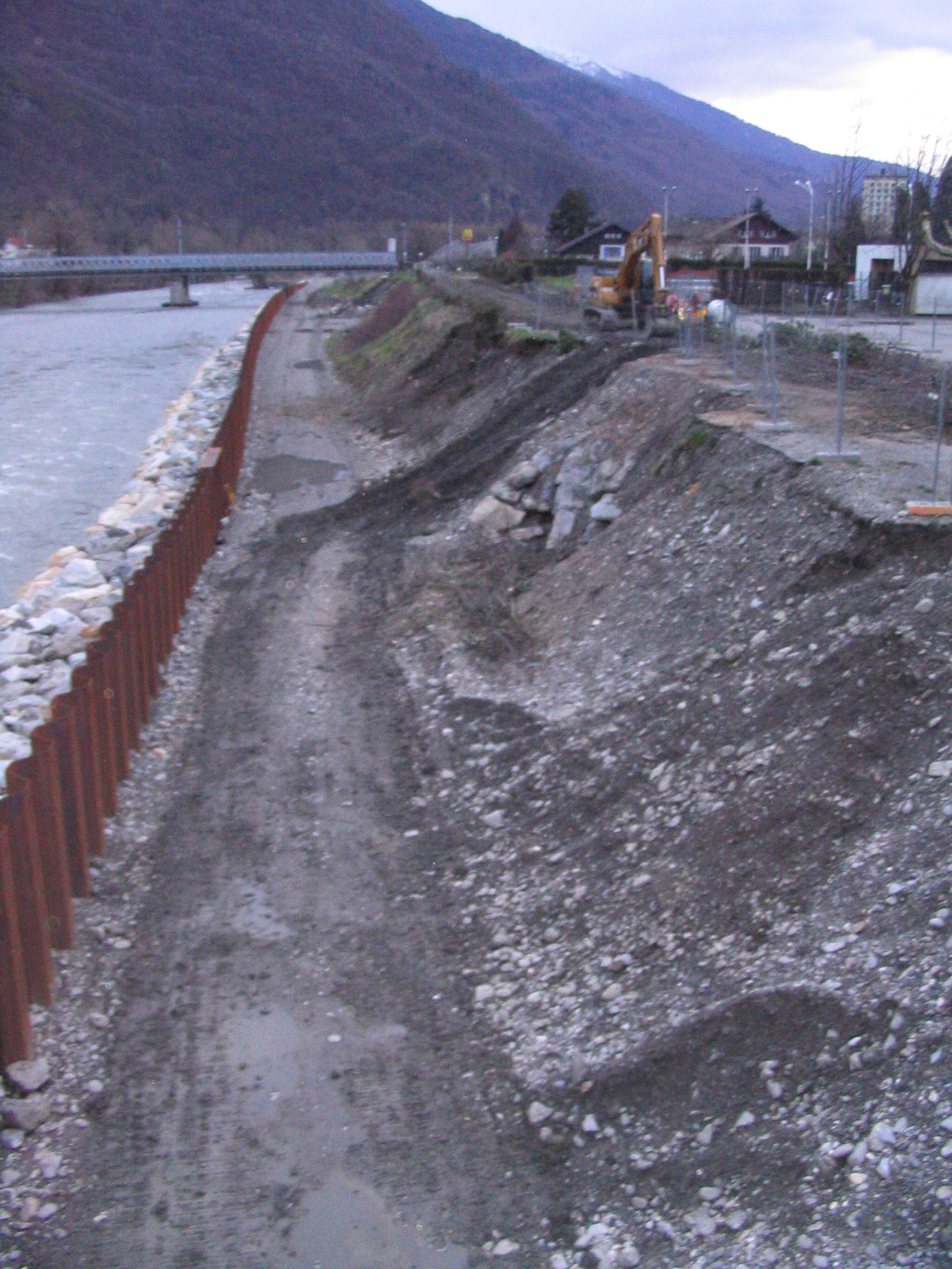 Les travaux de la voie sur berge à Albertville.